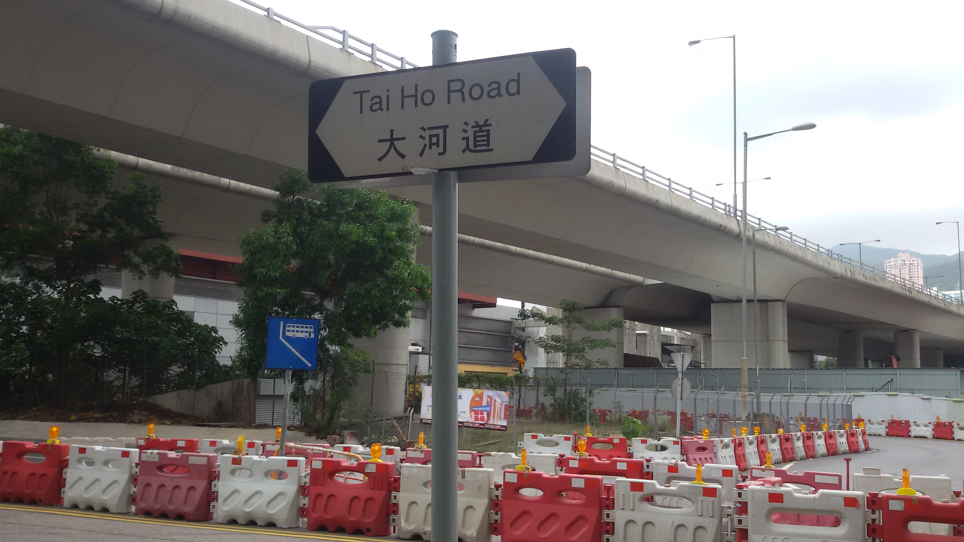 粵語: 大河道嘅路牌